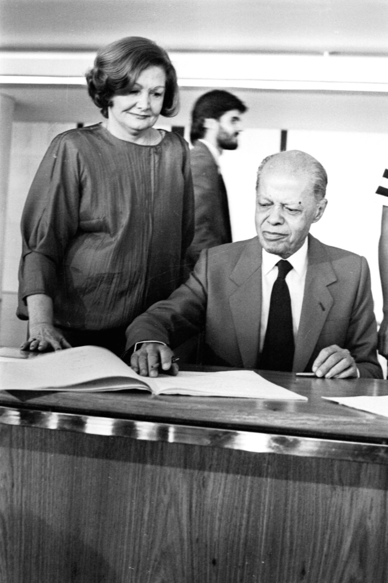 Assinatura da Constituição em 29/09/1988. Participantes - Senador Nelson Carneiro e esposa. Foto: Célio Azevedo